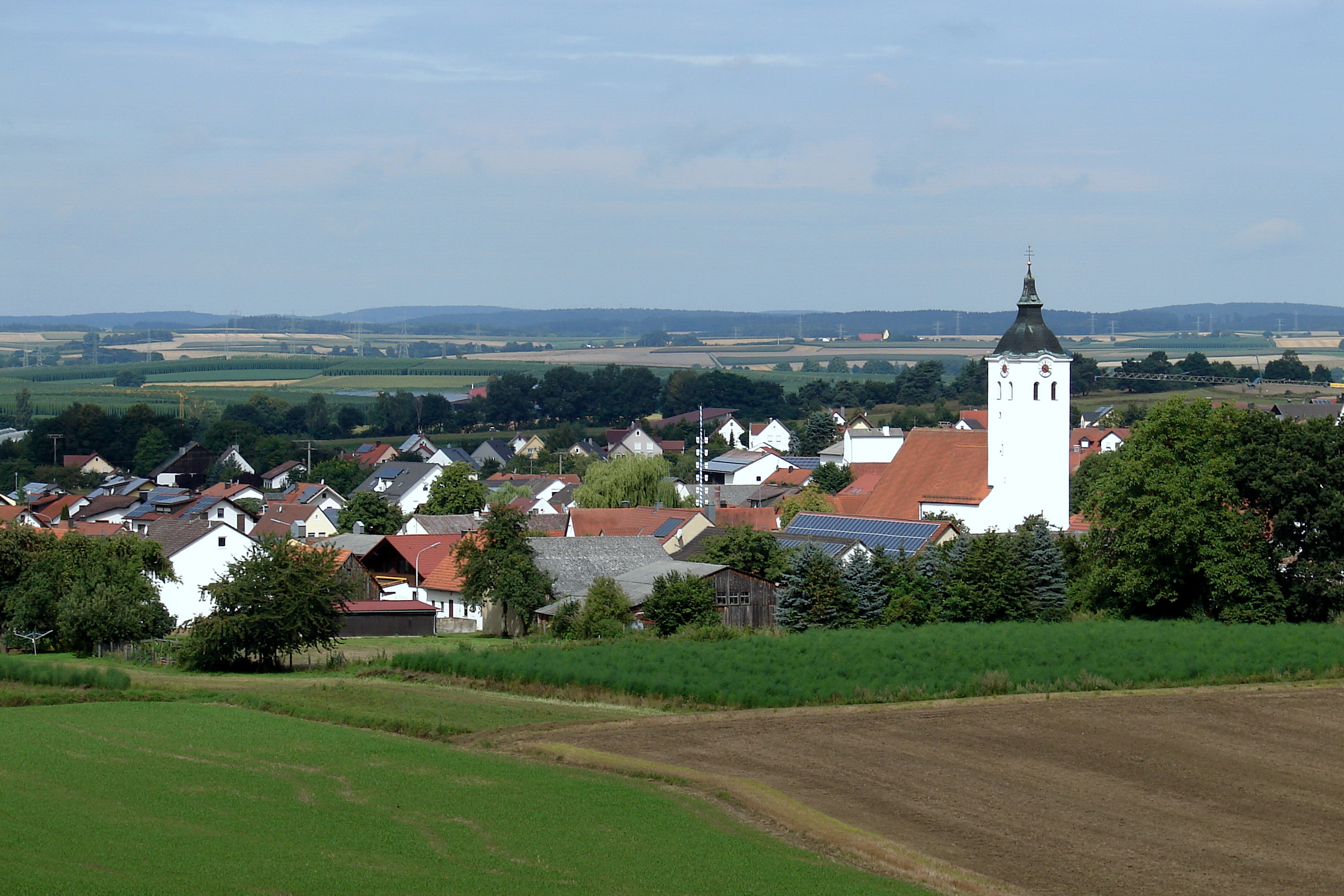 Sandharlanden ist Teil der Stadt Abensberg im Landkreis Kelheim in Niederbayern mit rund 1.000 Einwohnern.